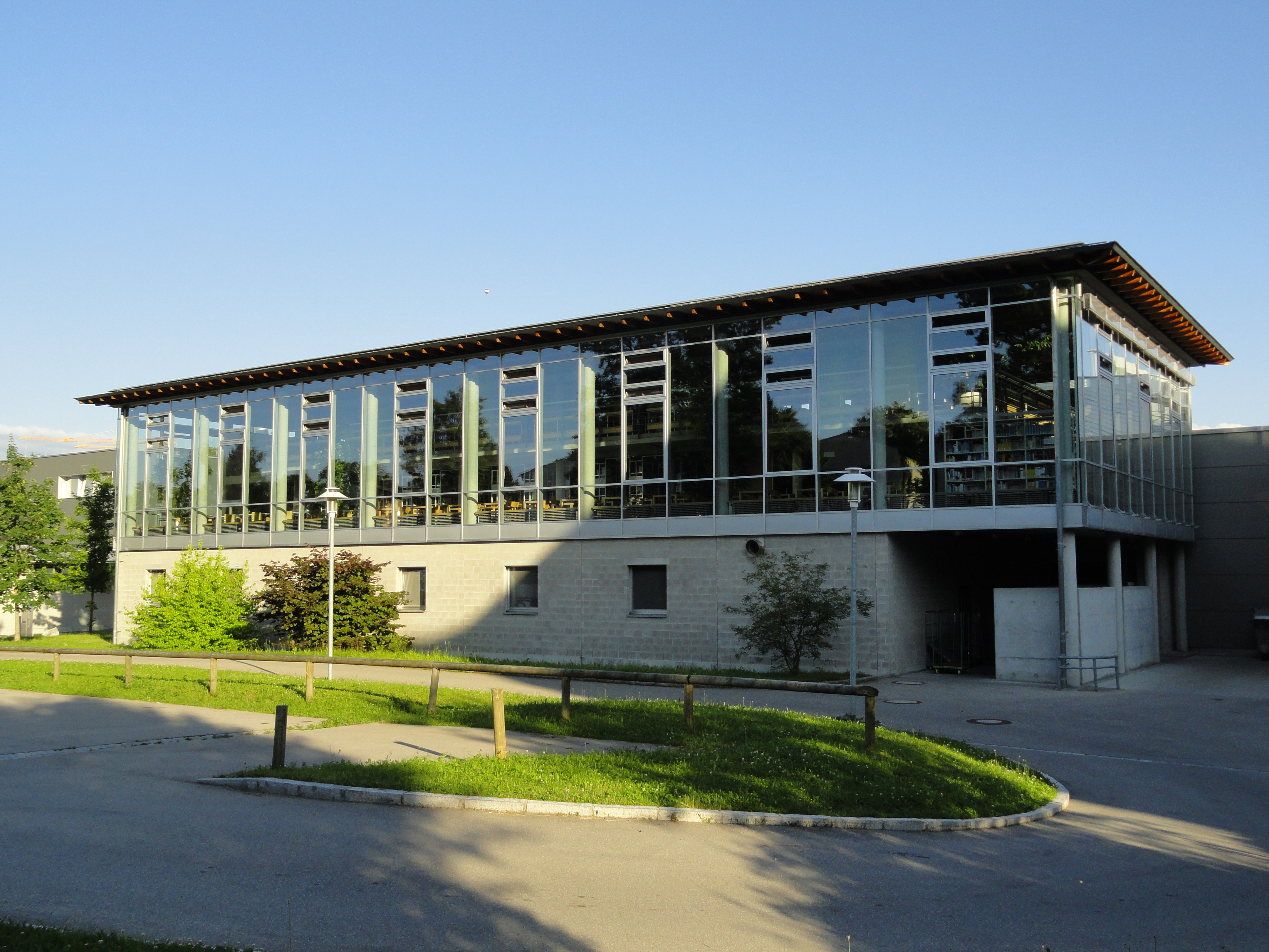 Hochschule Kempten, 2012 (mit schwarzem Neubau, auch "Swarowski-Haus" genannt)